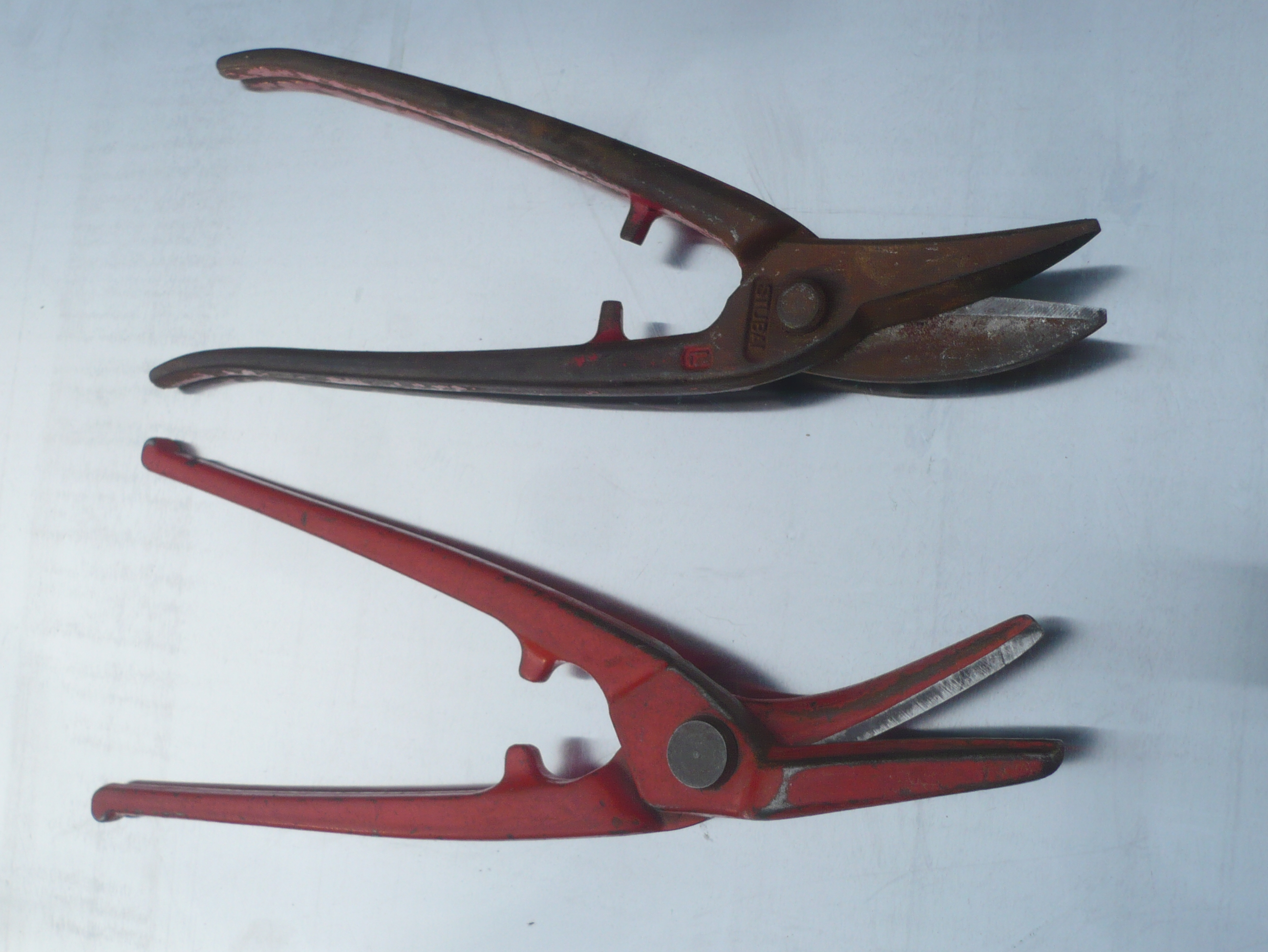 Deux cisailles utilisées en zinguerie : en bas de l'image, une cisaille droite ; en haut, une cisaille gauche.